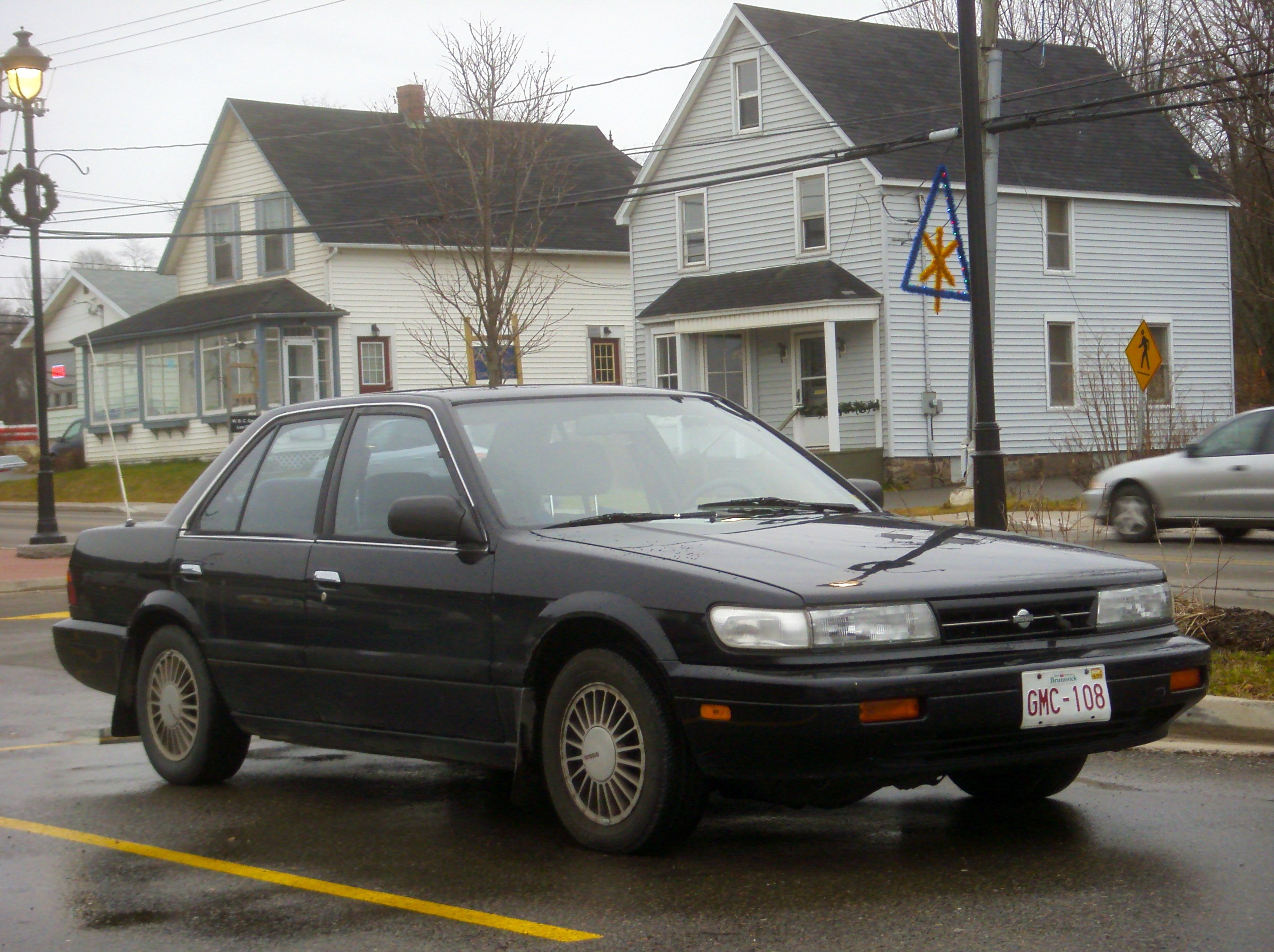 1990-1992 Nissan Stanza U12.